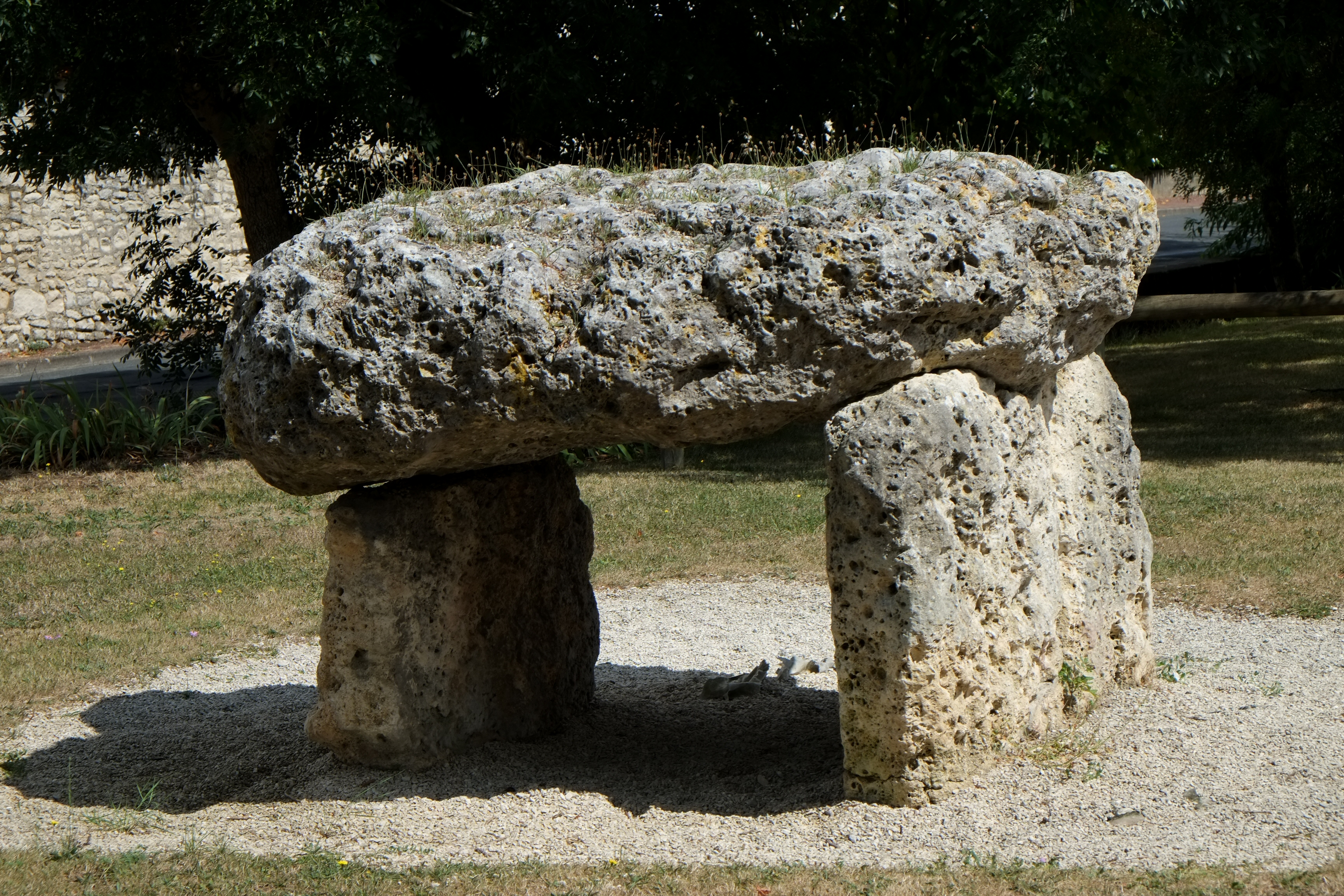 Dolmen de la Piere Levée La Jarne Charente-Maritime France